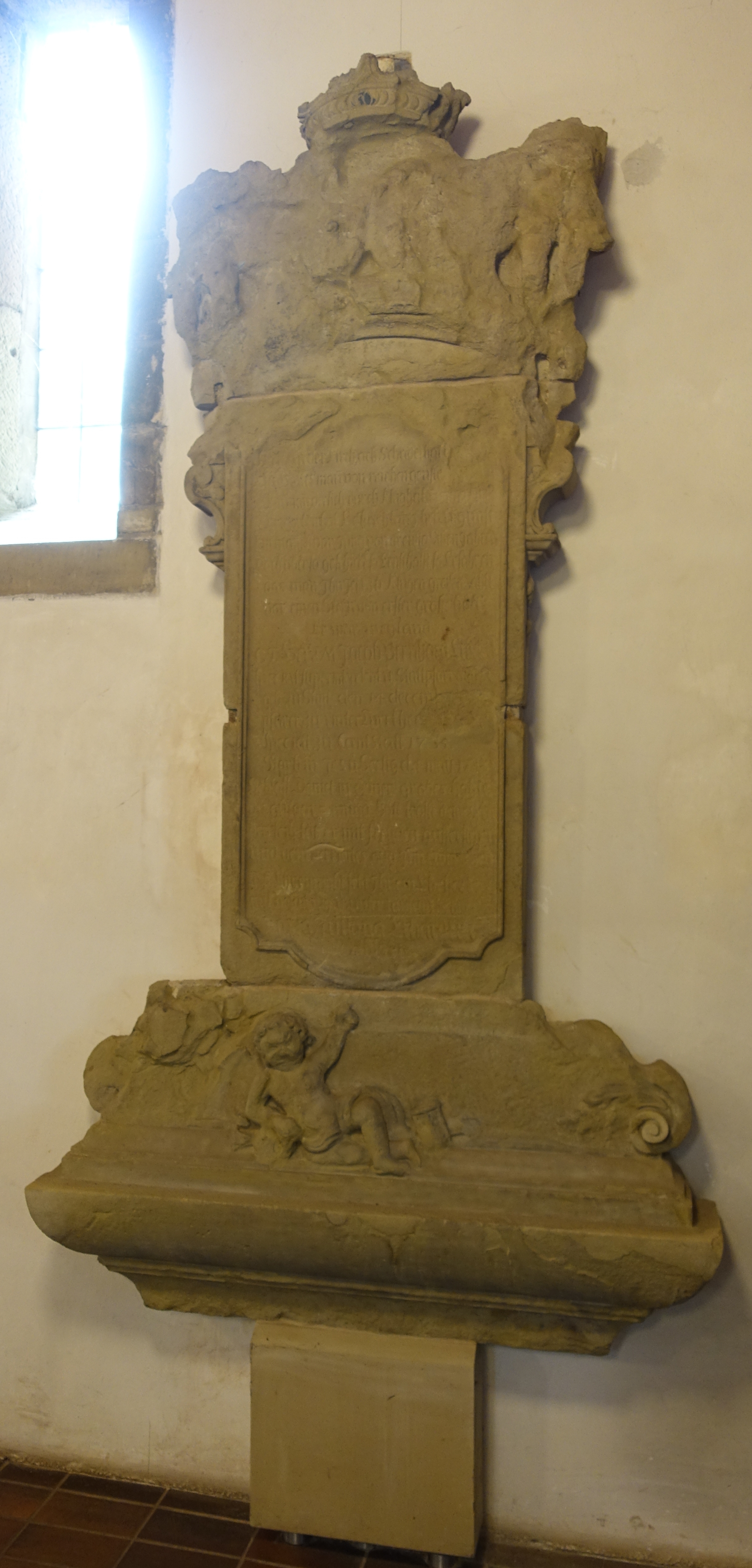 Epitaph an der Südwand in der Uffkirche auf dem Uff-Kirchhof in Stuttgart-Bad Cannstatt für den Cannstatter Pfarrer Jakob Bernhard Erhard.